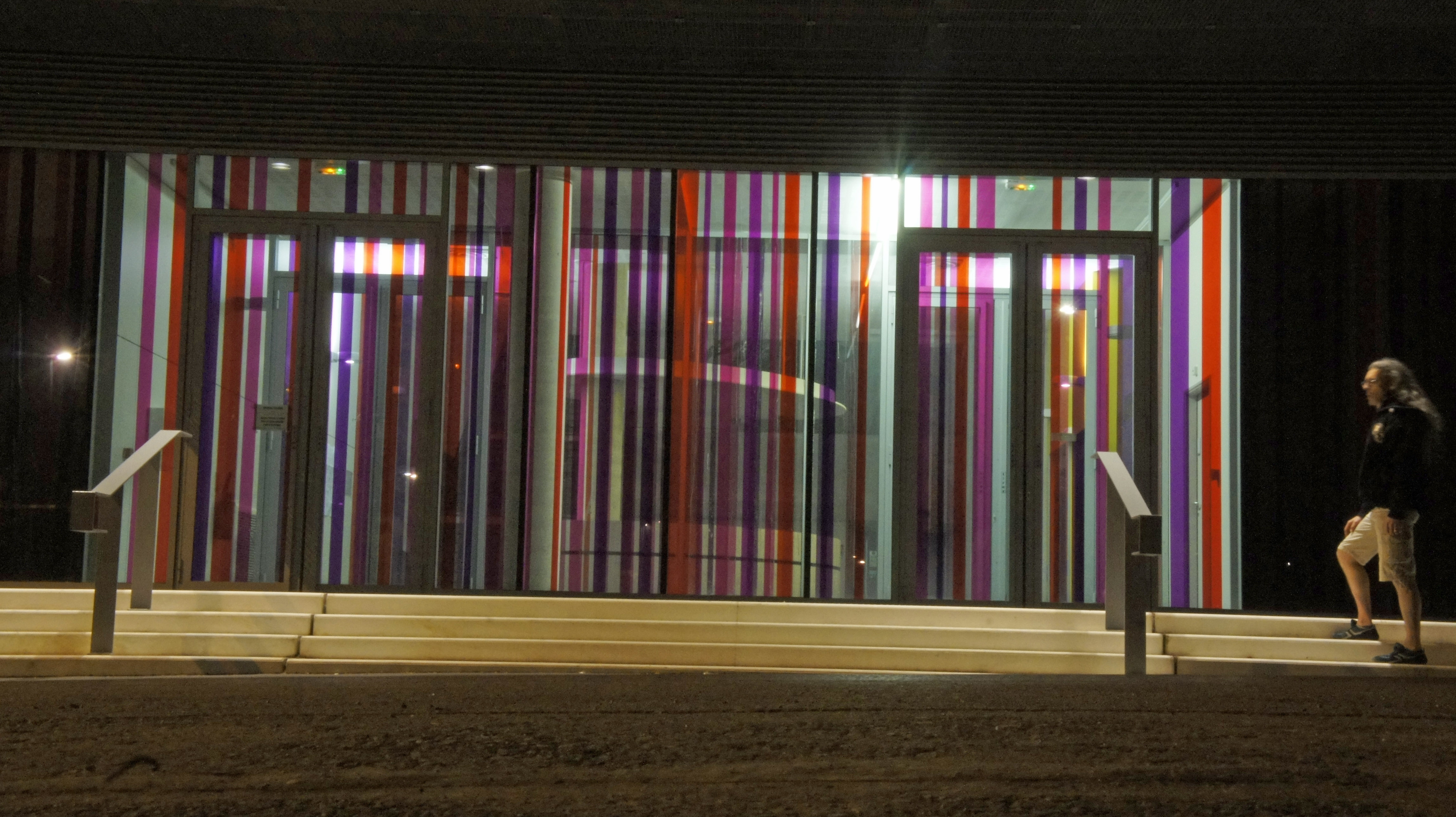 rue Cognac Jay , vue de nuit.